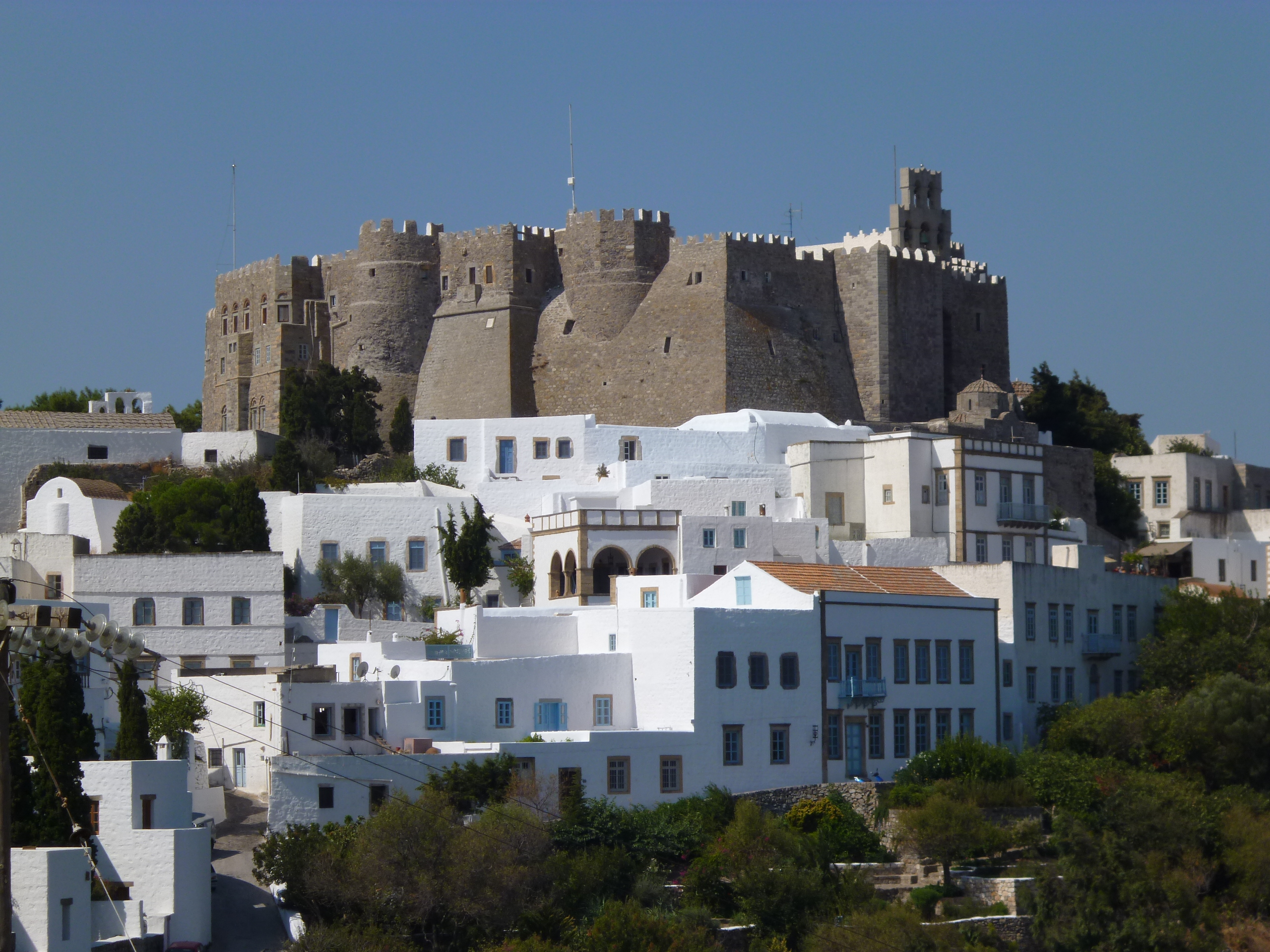 Vista della Chora (centro storico) dell'isola di Patmos e del Monastero di San Giovanni il teologo, cinto da altissime mura